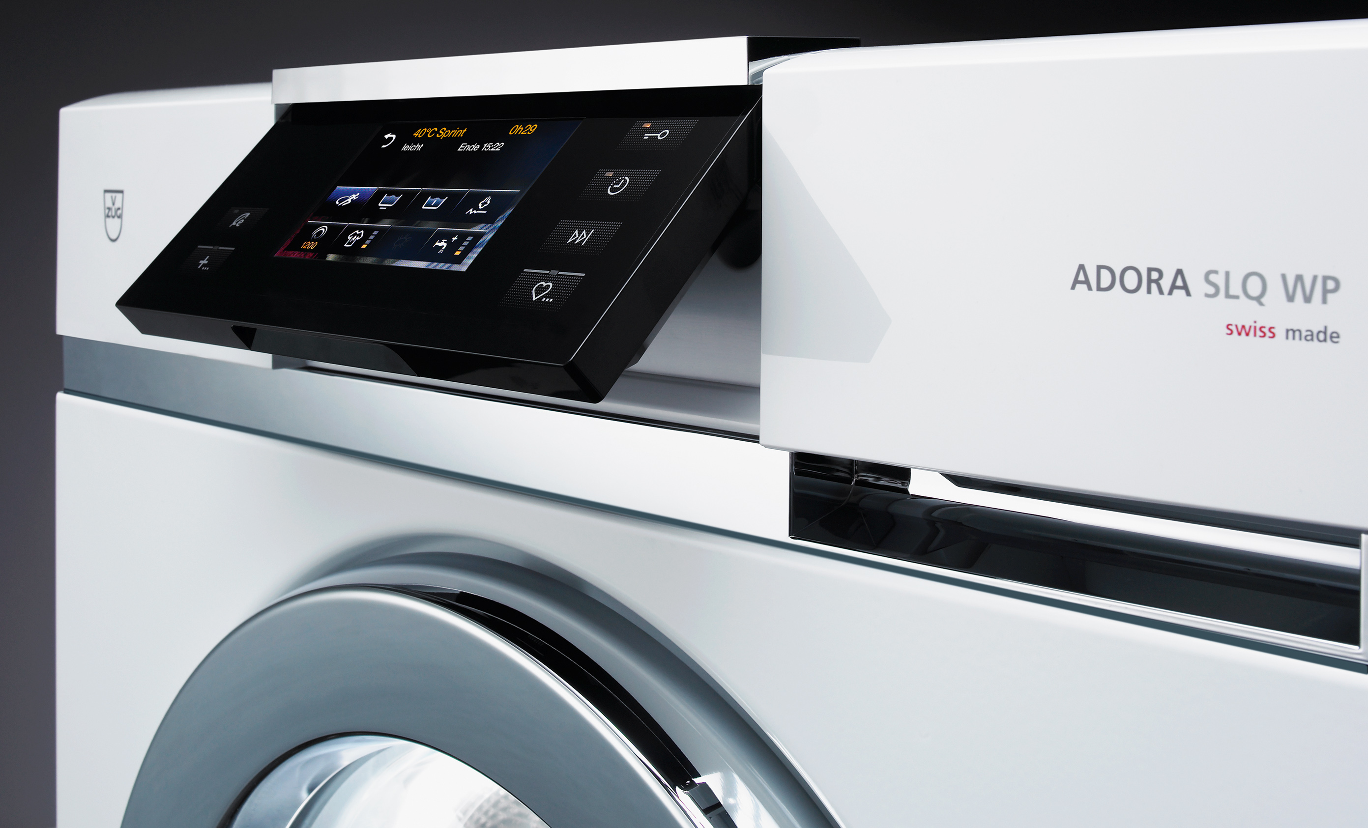 Moderne Waschmaschine mit Wärmepumpe